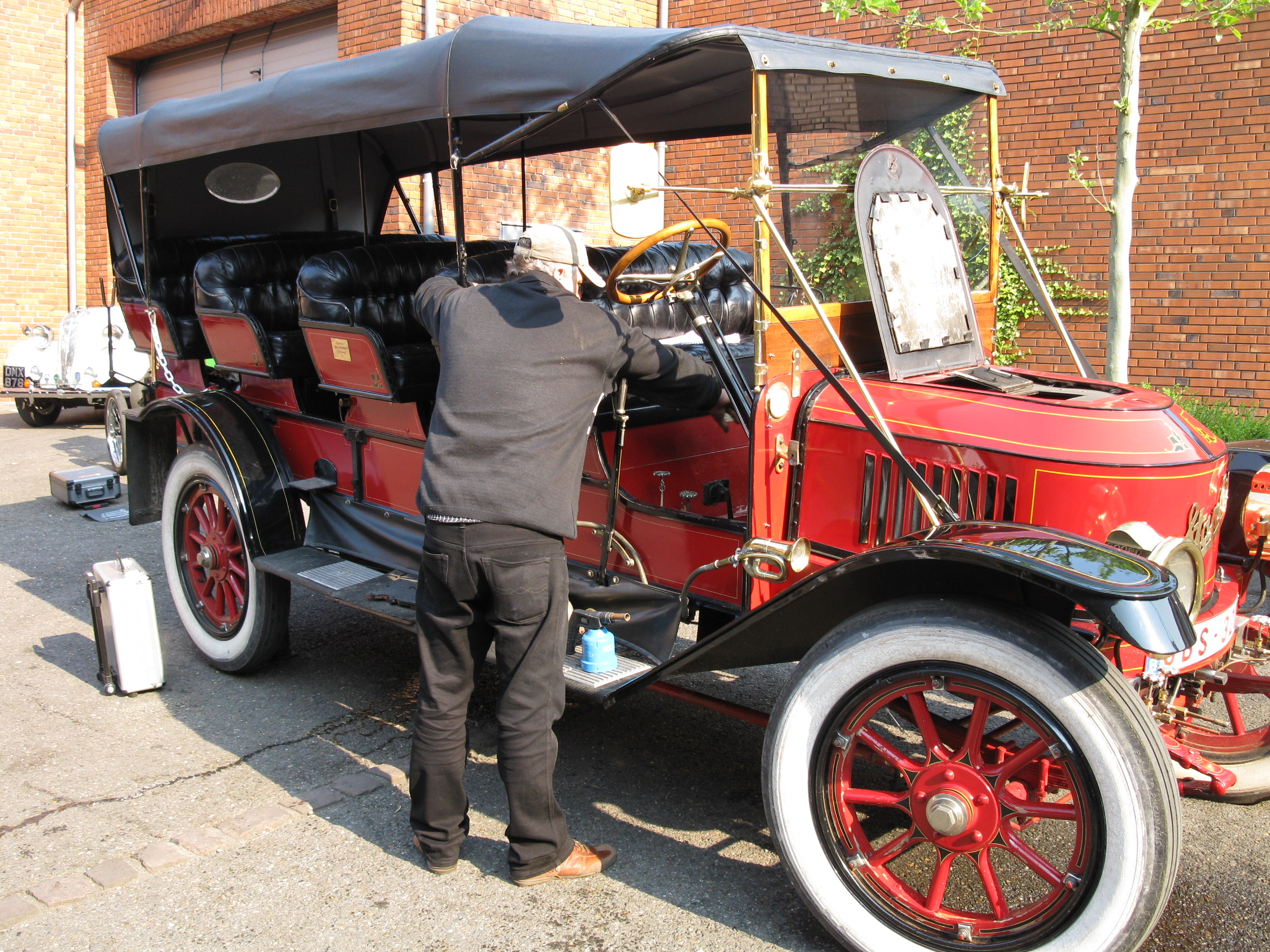 Stanley Steamer 30 HP Mountain Wagon 12-Plätzer (1912-1914) aufgenommen bei der 12. Deutsche Dampf Automobil Fahrt "Dampf in Melle"